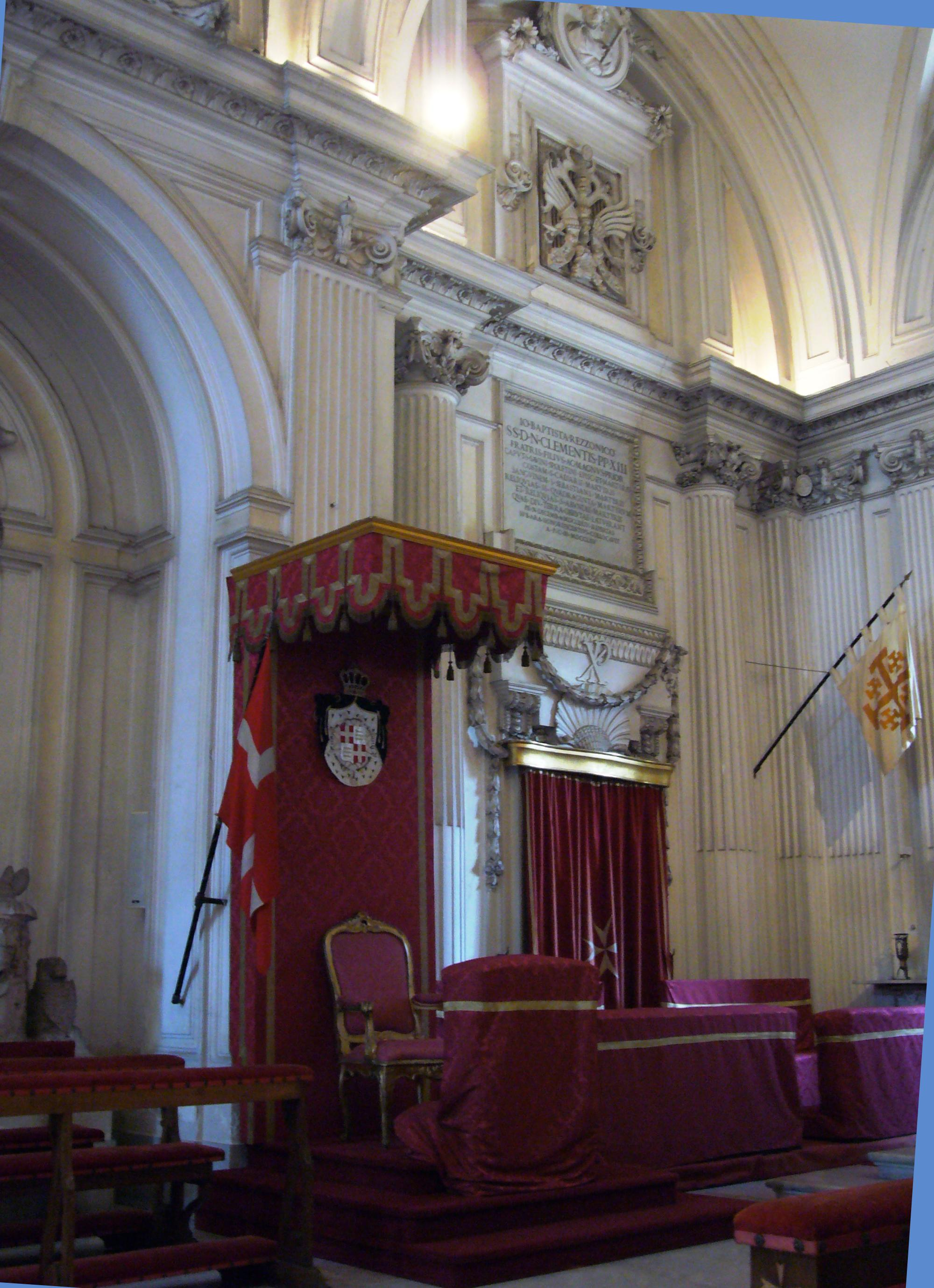 Roma, Villa del Priorato dei Cavalieri di Malta: Santa Maria del Priorato, trono magistrale (lo scanno del Gran Maestro)